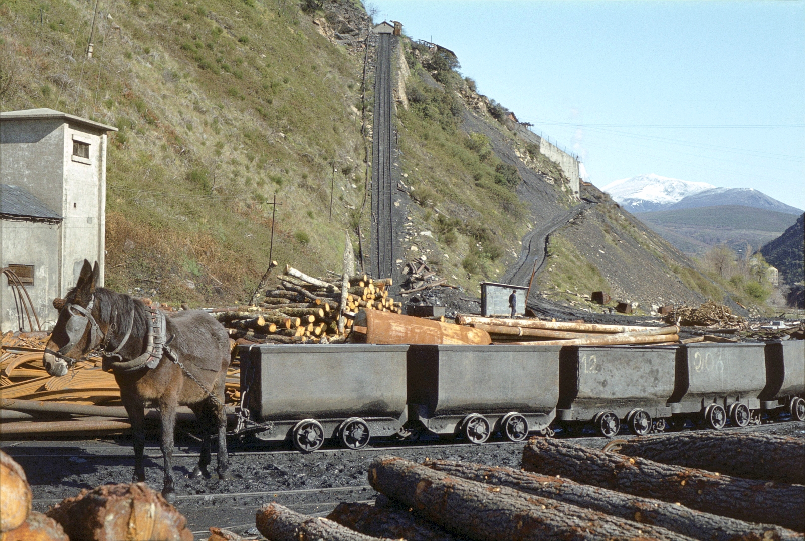 Traction animale pour les manœuvres des berlines, au pied d'un d’un plan incliné à Santa Cruz del Sil en 1983.